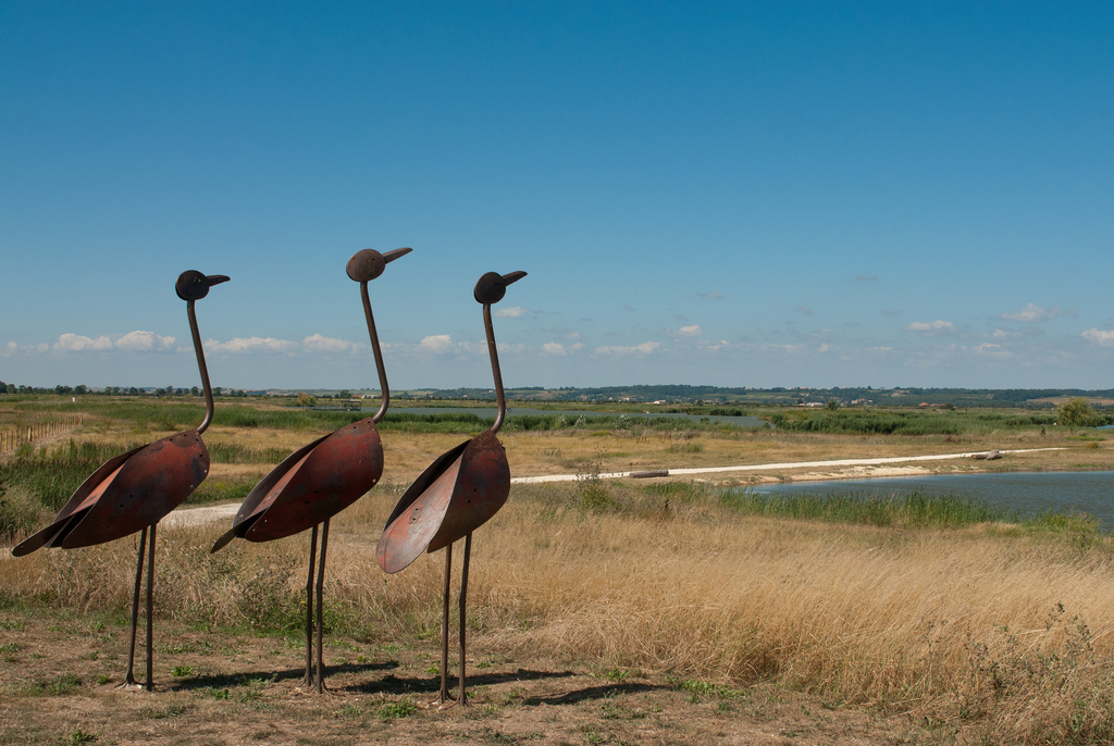 Le port-nature de Vitrezay est entre la Charente-Maritime et la Gironde.